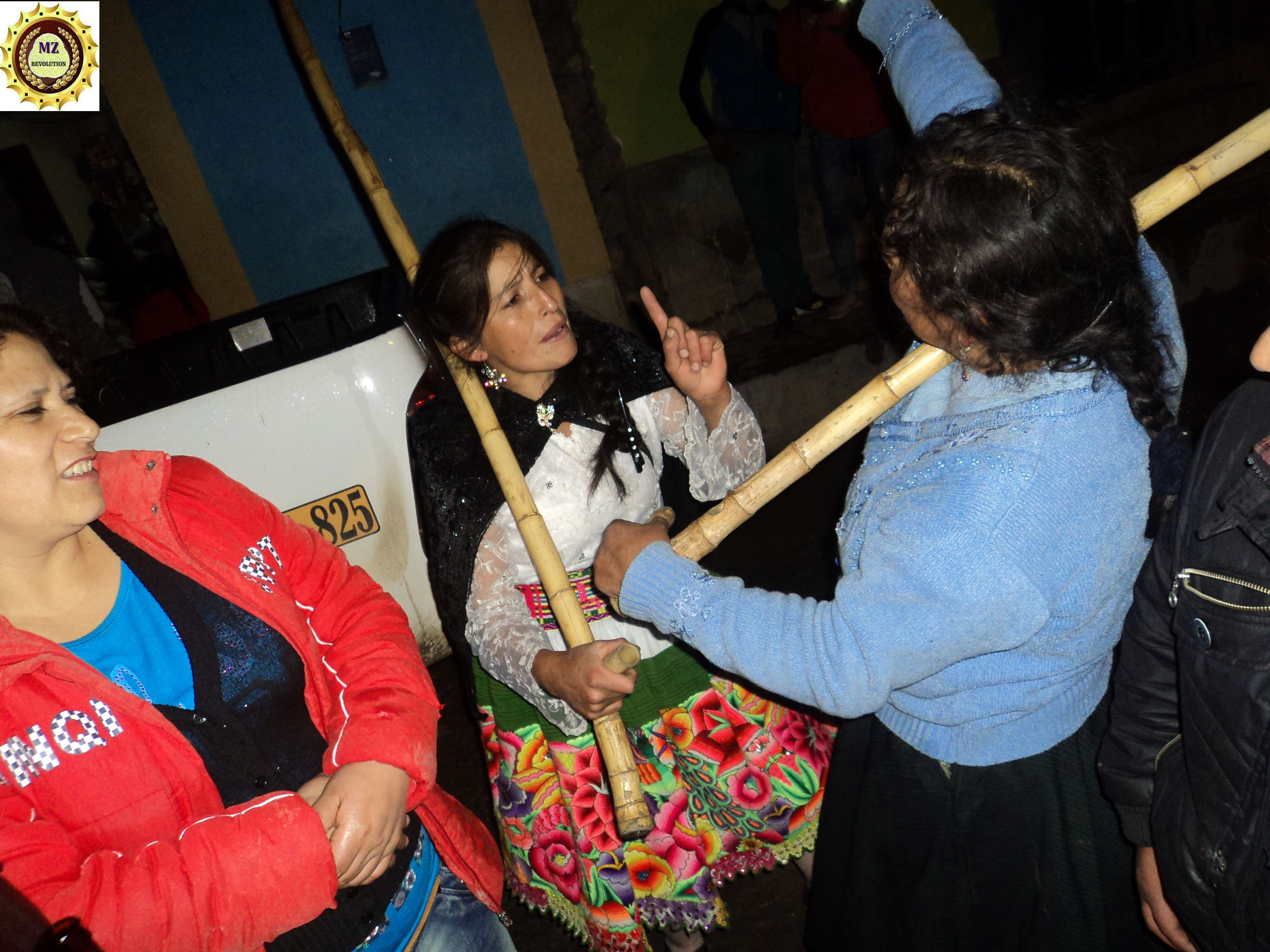 Competencia de Chimpachimbino de las Salcabambinitas